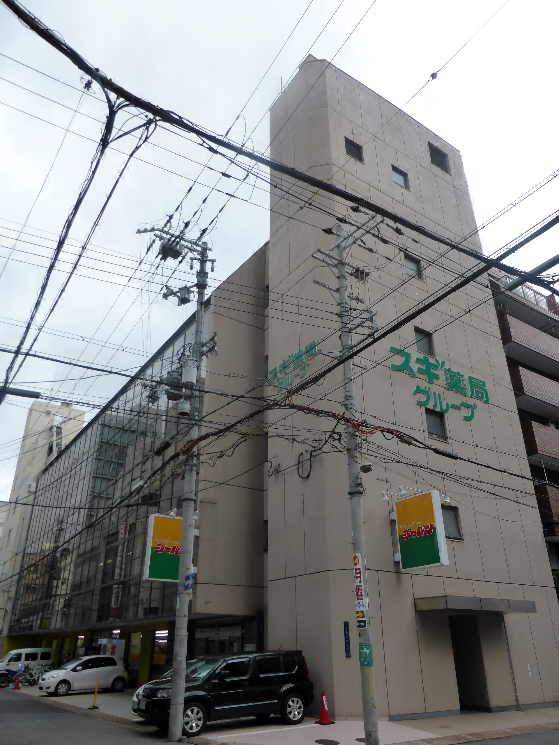 ジャパン中央プチジャパン店を撮影。